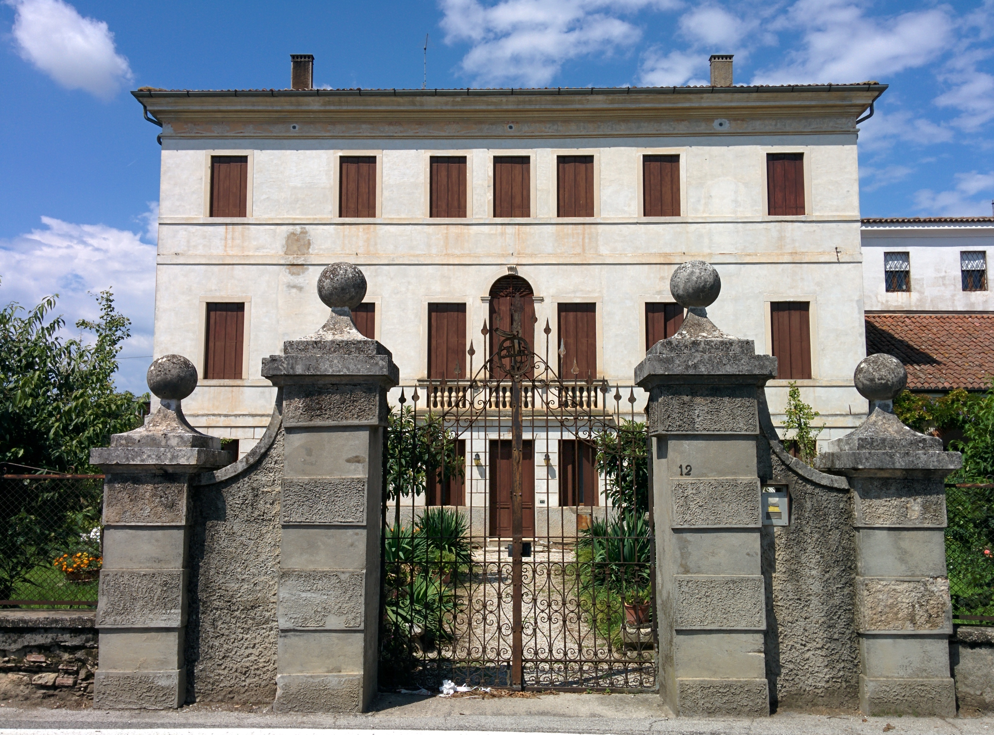 Villa Fogazzaro-Arnaldi a Caldogno, provincia di Vicenza.